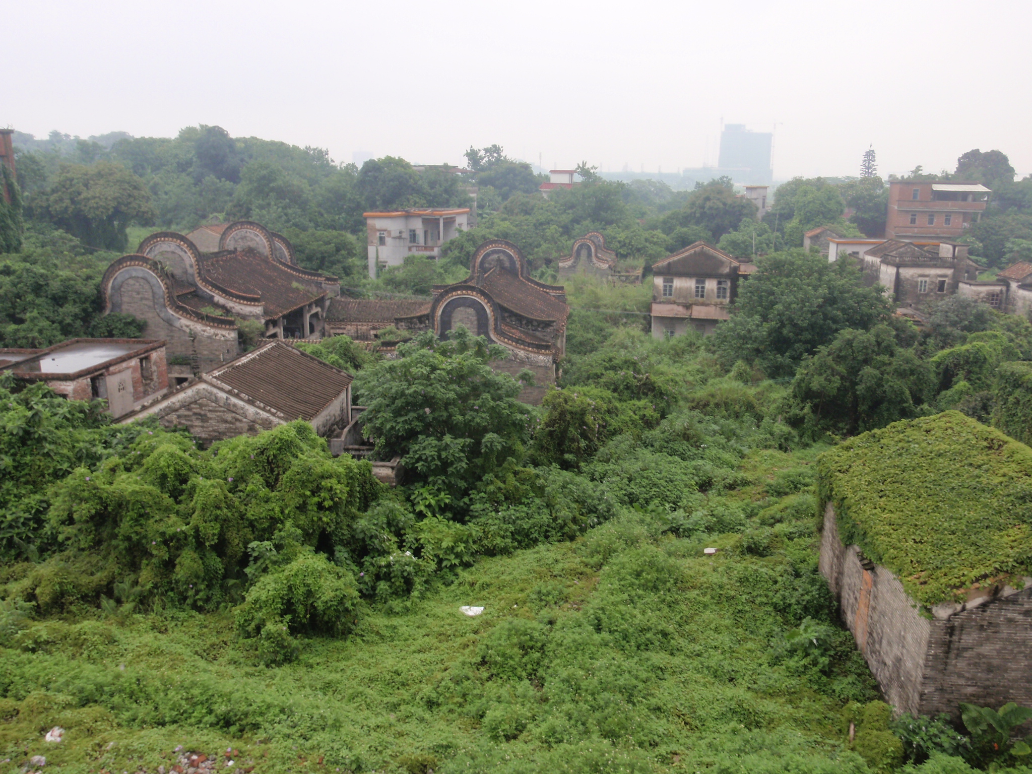 粵語: 廣州官洲島